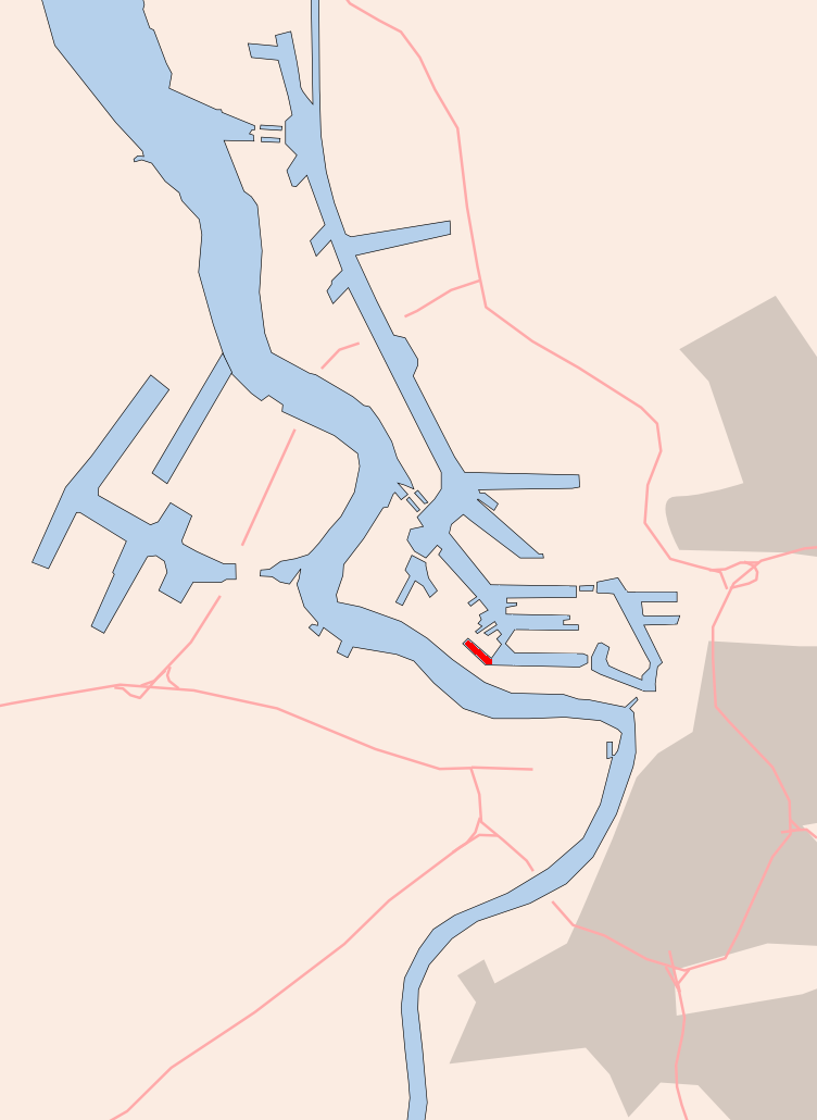 Antwerp , Industriedok